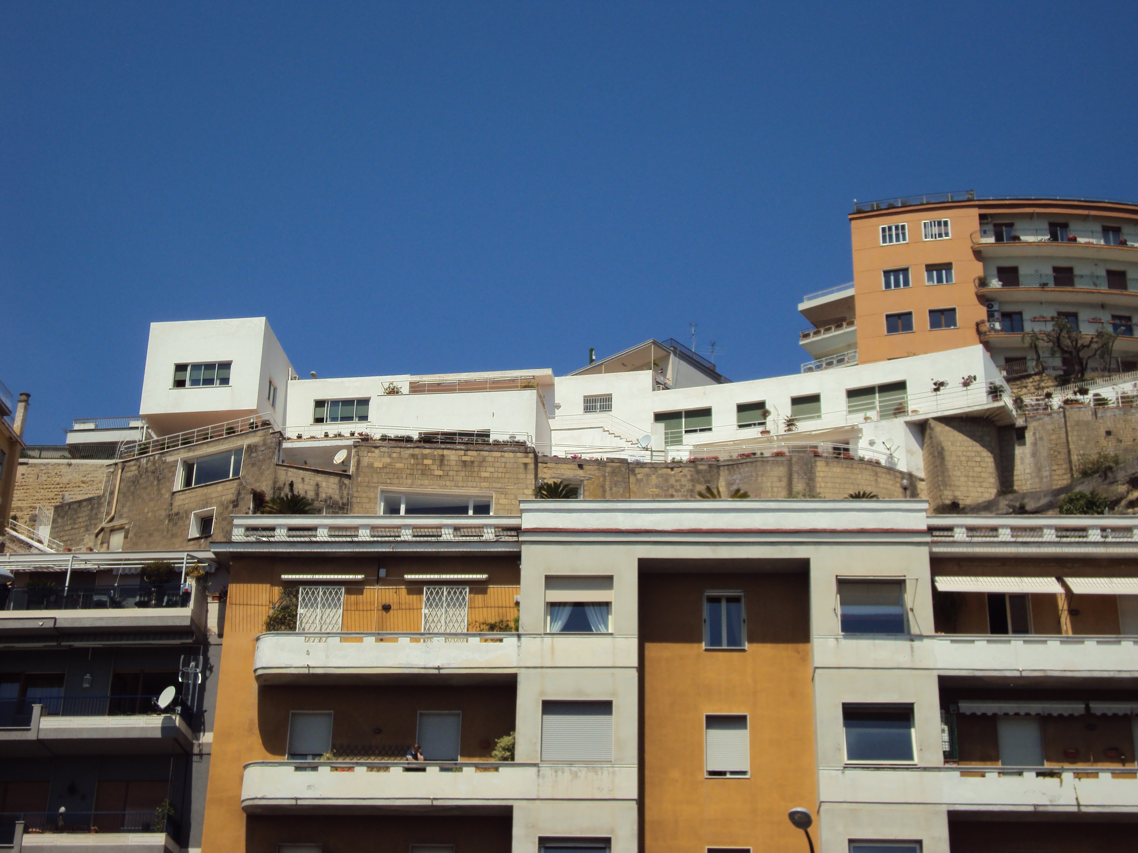 Villa Oro